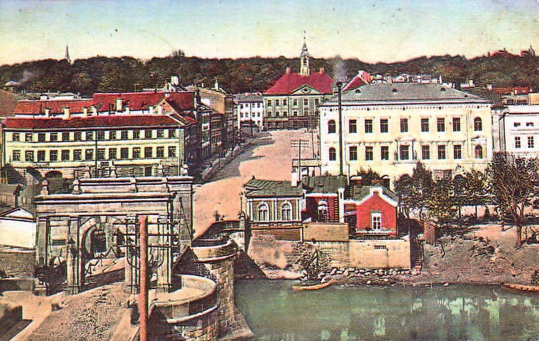 Vaade Kivisillalt Tartu raekojale